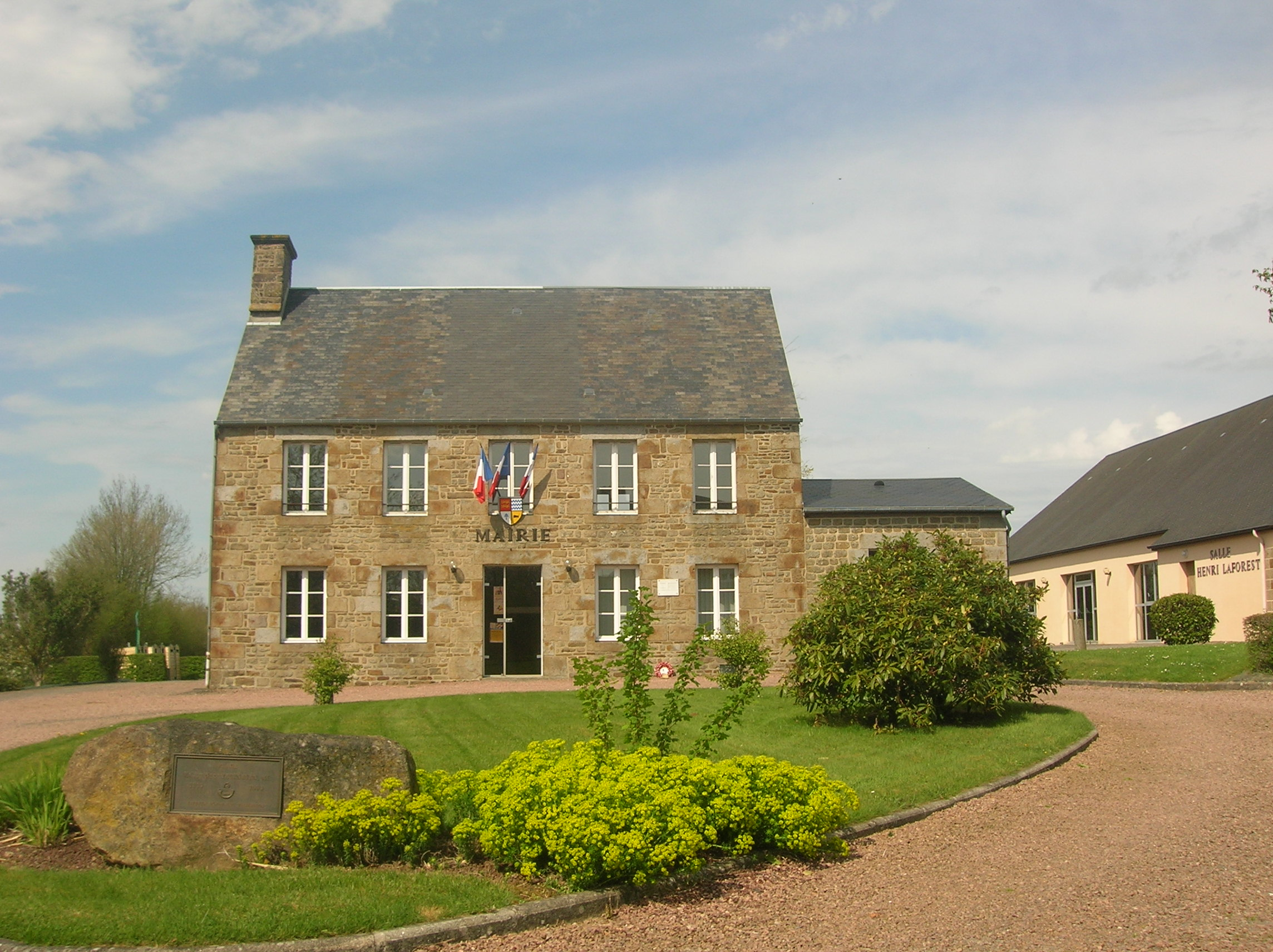 Photographie de la Mairie de la commune d'Aubusson (Orne)